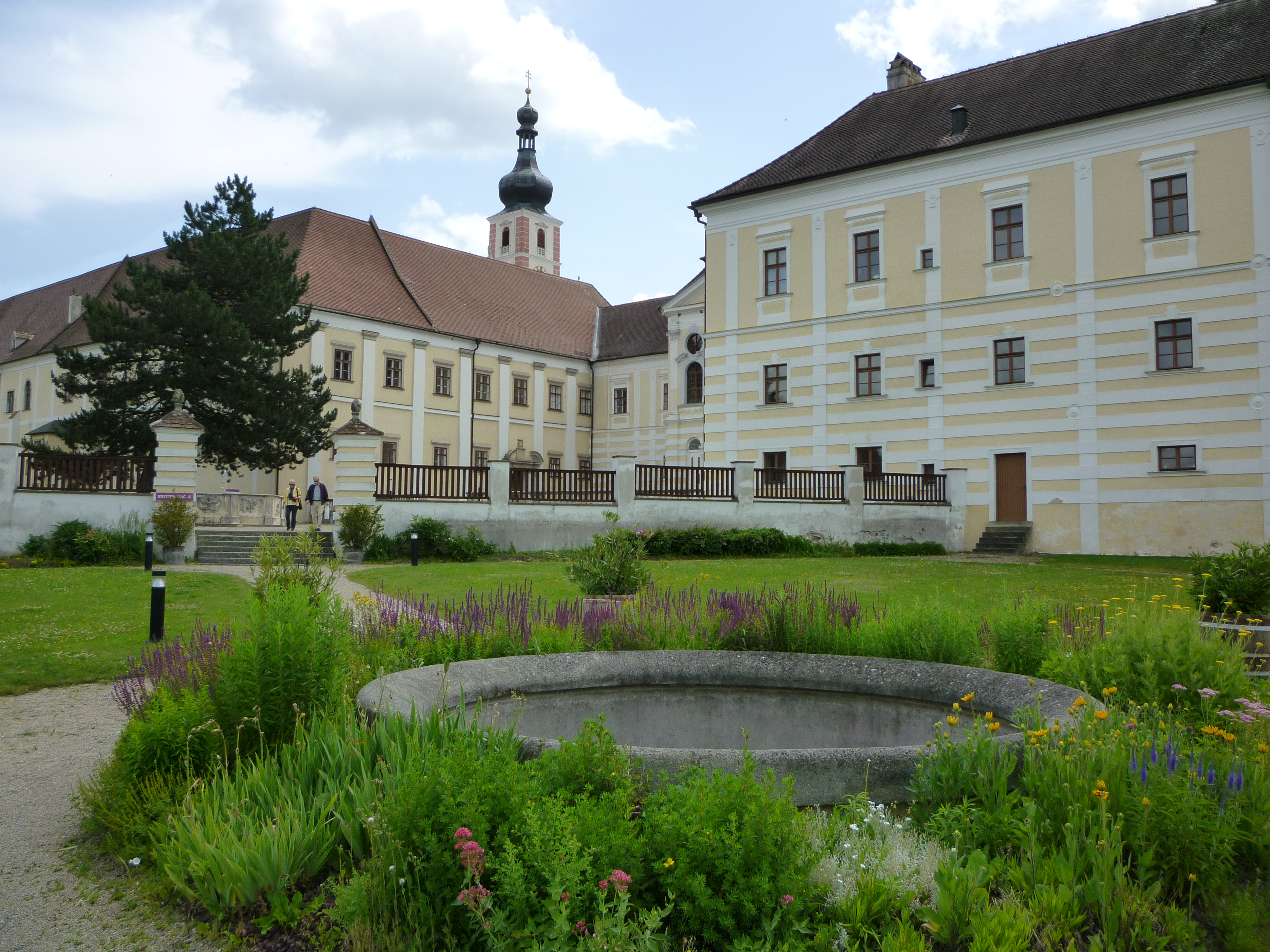 Stift Geras